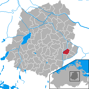 Grapzow, Landkreis Demmin, Mecklenburg-Vorpommern